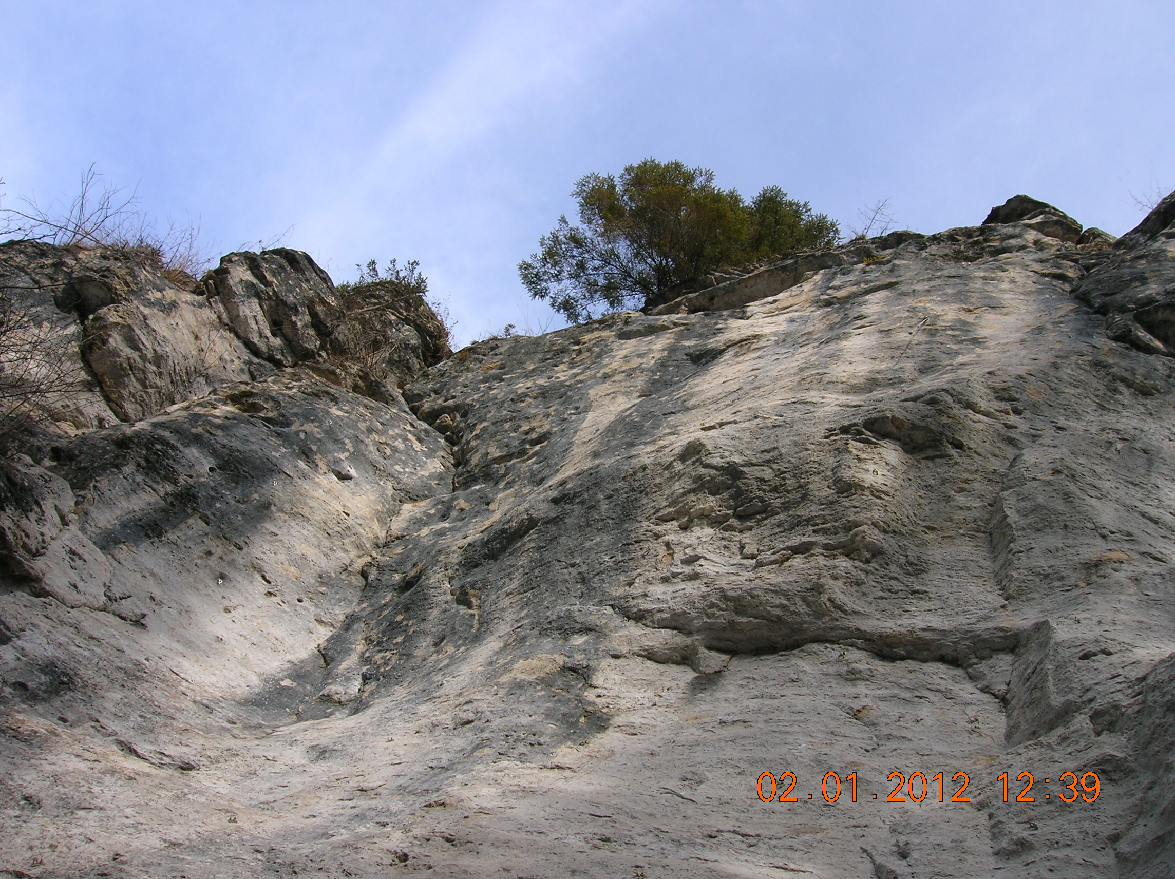 Jud. Harghita, Oraş Borsec, Rezervaţia Scaunul Rotund, Grota Urşilor